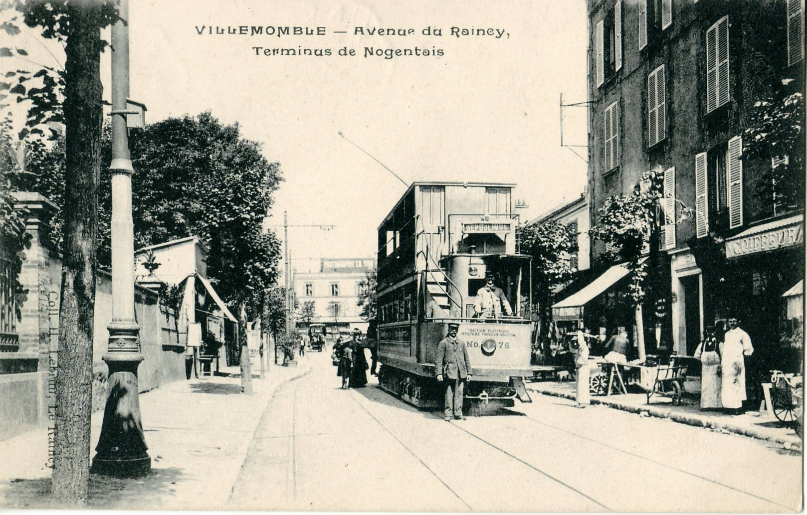 Carte postale ancienne éditée par Lebrun VILLEMOMBLE - Avenue du Raicy - Terminus du Nogentais (Ligne 6 des Nogentais)